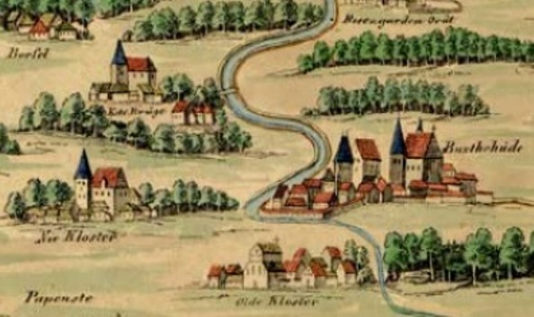 Buxtehude und das Oldekloster auf der Elbkarte von Melchior Lorichs (1568) in der Fassung von Eugen Schuback (1843)